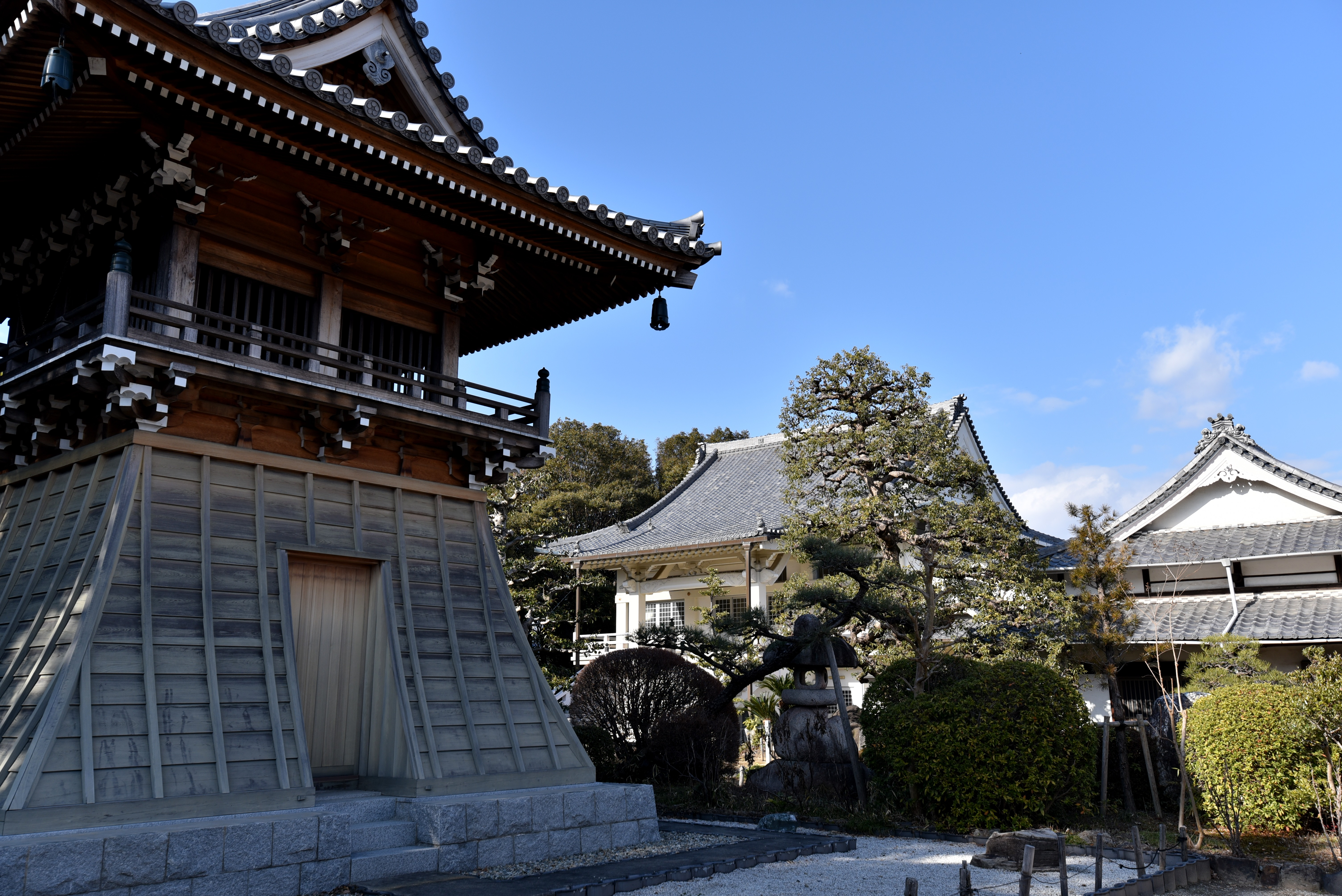 瑞応寺の境内 Nikon D750